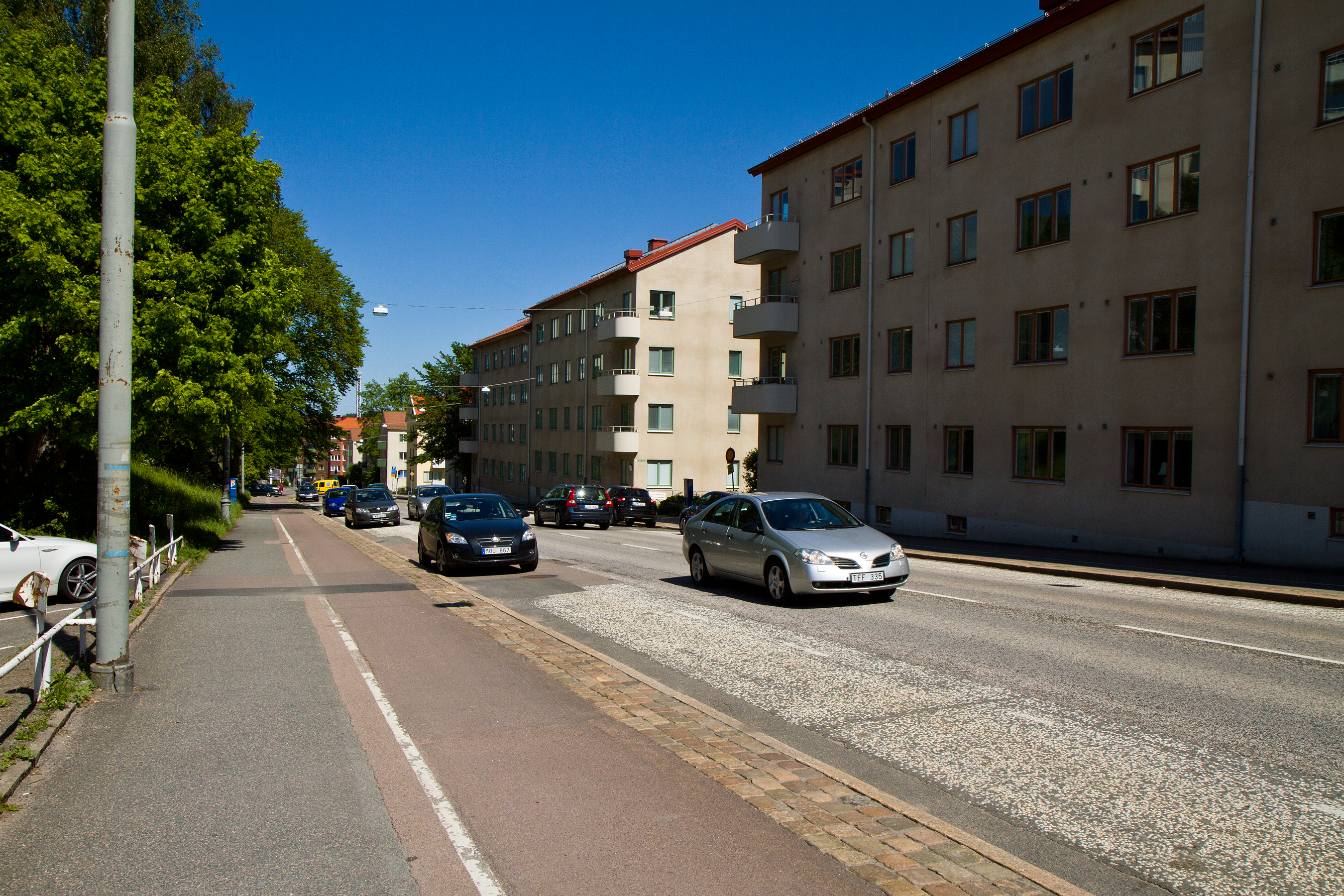 Eklandagatan, Juni 2011